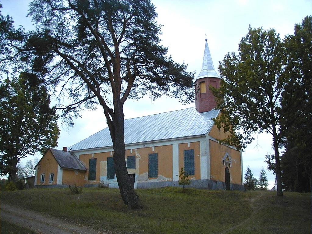 Zeltiņu evaņģēliski luteriskā baznīca 2002-09-13